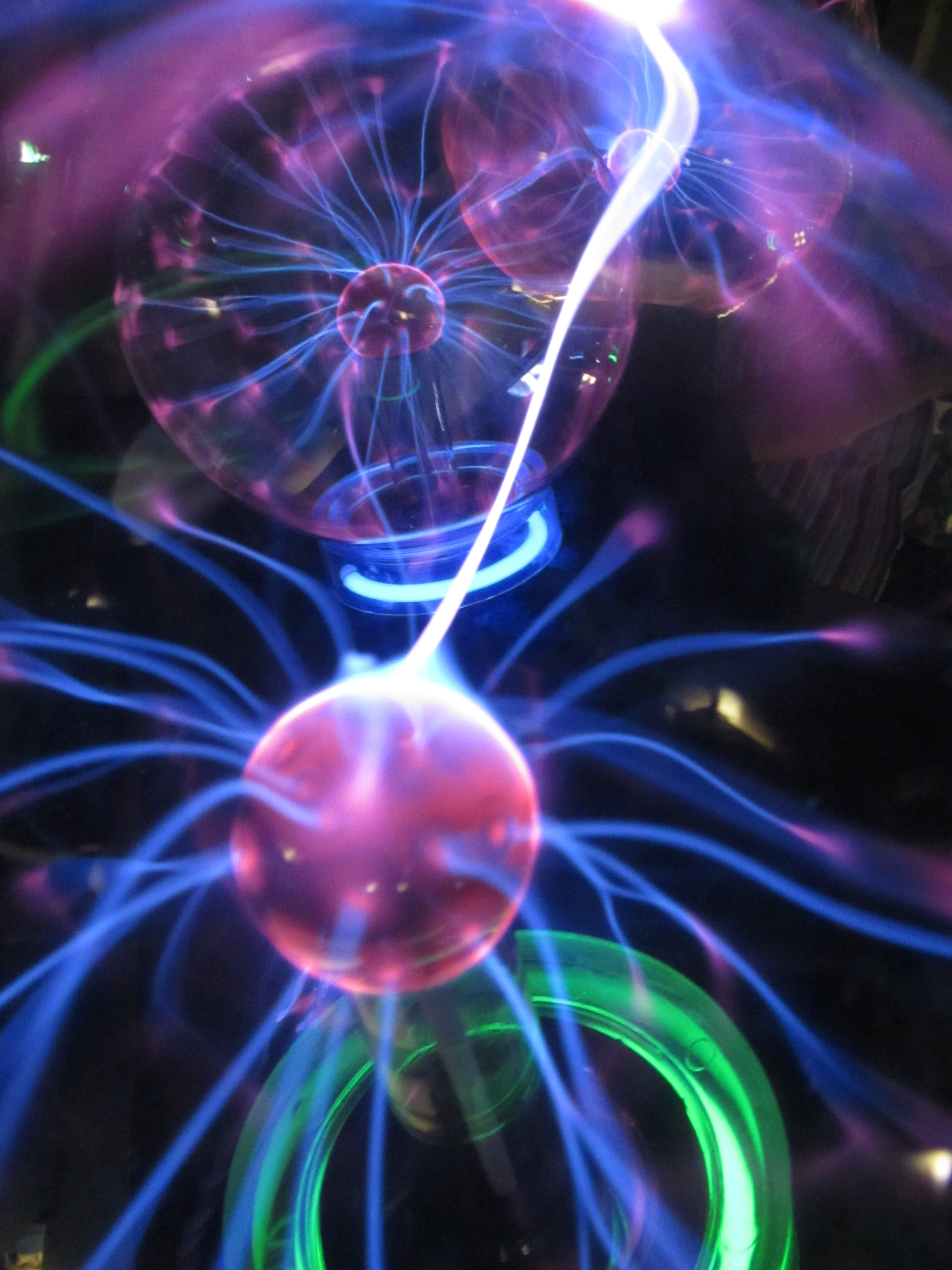 Välgukerad AHHAA valgusnäitusel "AHHAA, särab ja säriseb!"